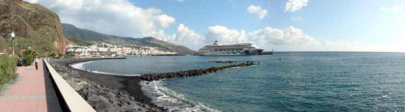 La Palma